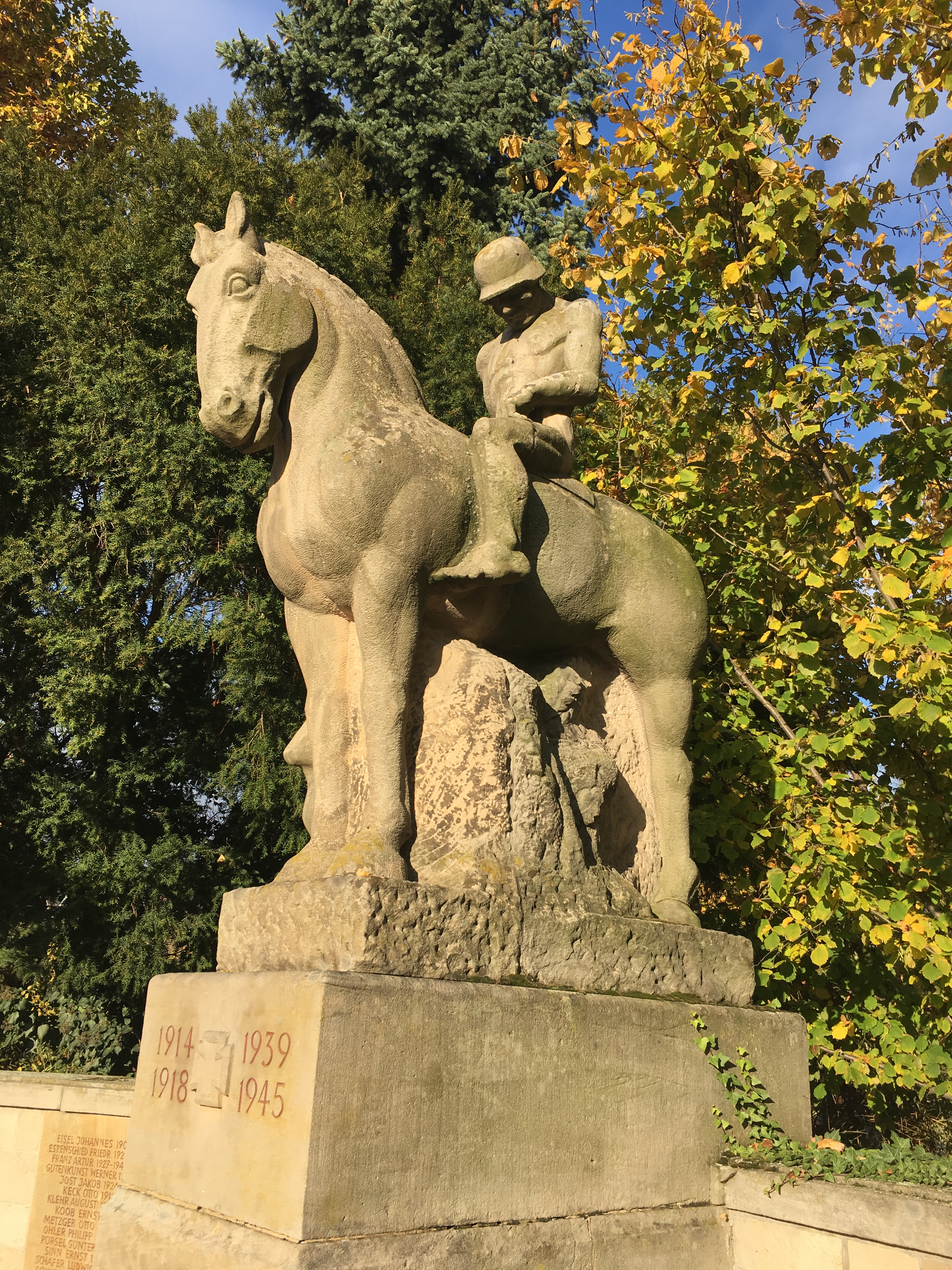 Das von Fritz Herrfurth 1929 gestaltete Kriegerdenkmal am Alten Friedhof (Hauptstraße) in der Gemeinde Dannstadt-Schauernheim, Ortsteil Dannstadt.